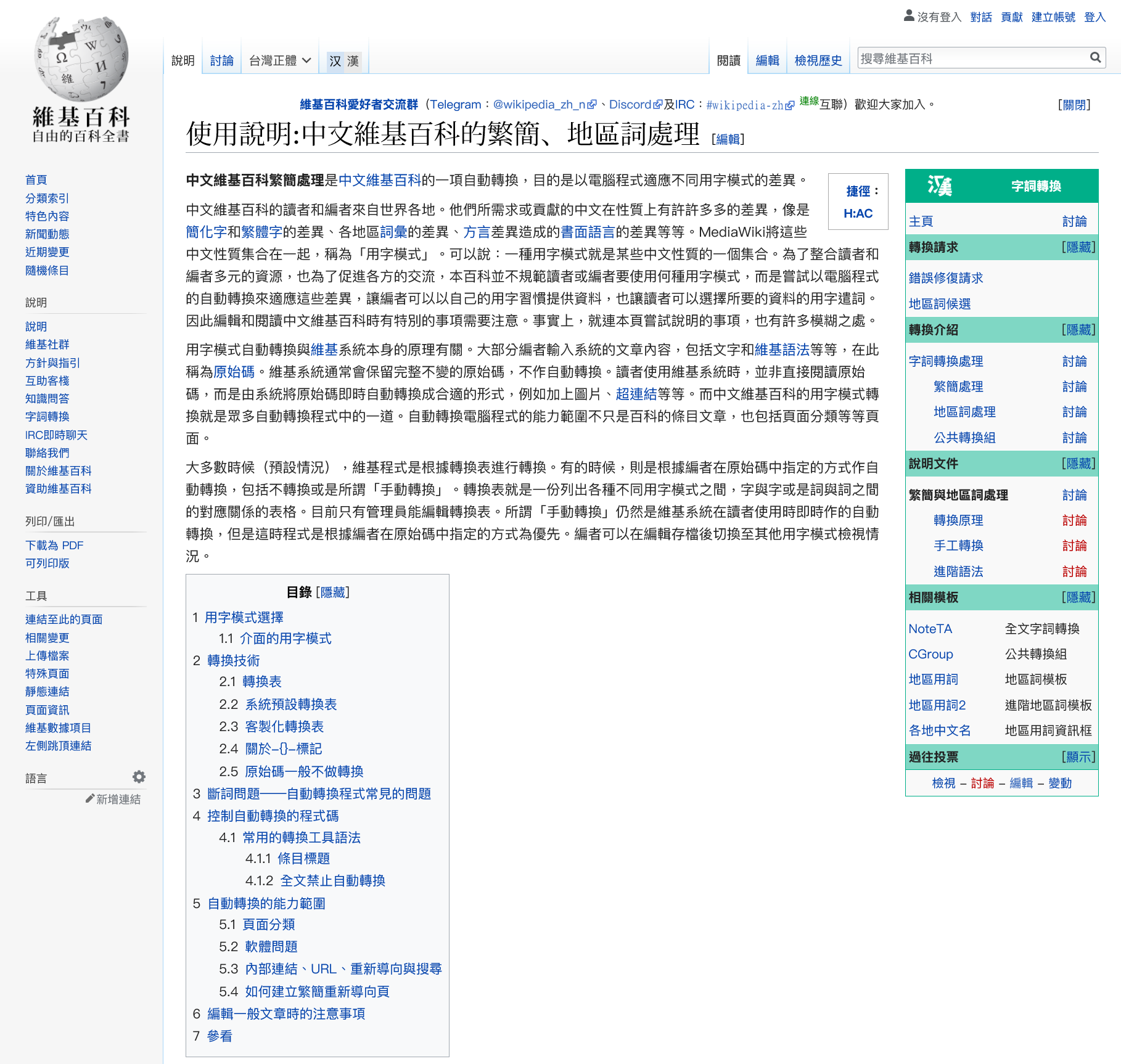 繁简体转换的实行措施。